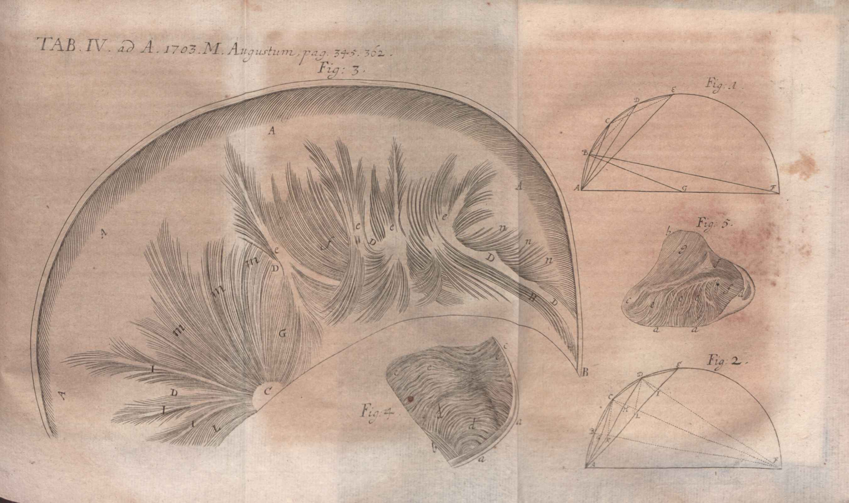 Illustration